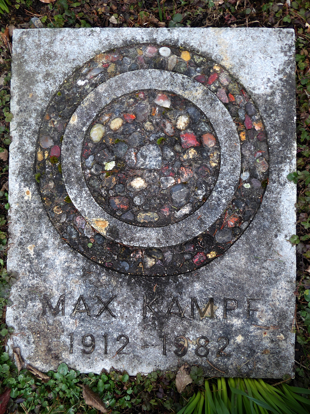 Max Kämpf (1912–1982) Künstler, Maler, Zeichner, Fresko, Illustrationen, Aquarell, Mitbegründer der Basler Künstlergruppe Kreis 48, Grab auf dem Friedhof Hörnli, Riehen, Basel-Stadt